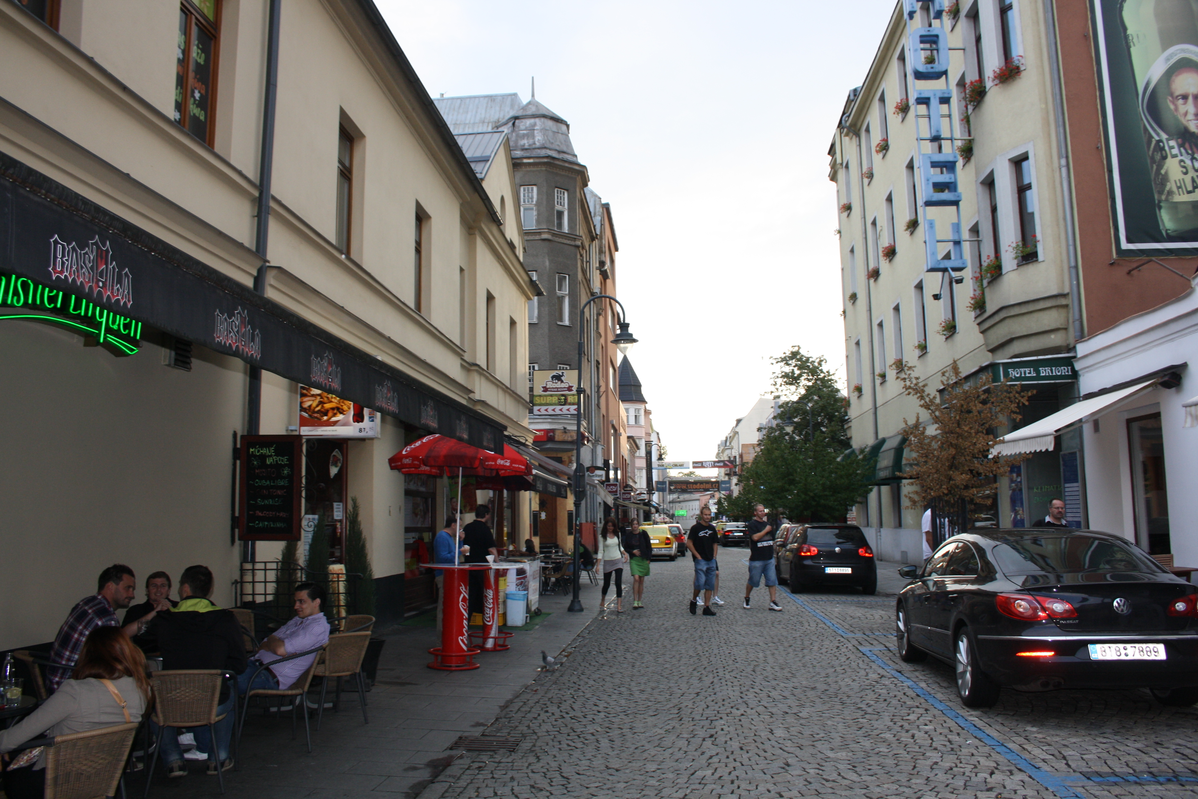 Description